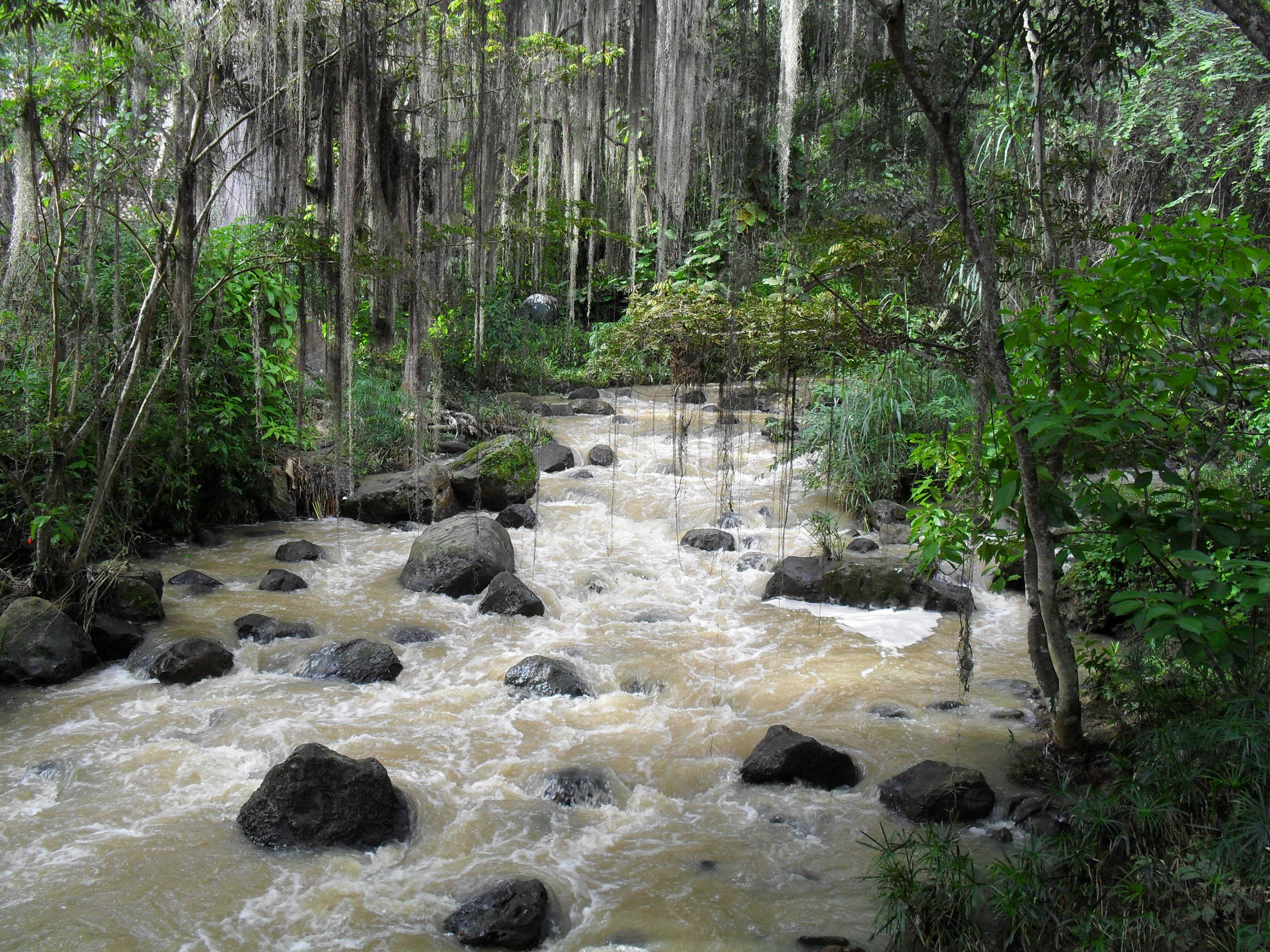 Curso de agua en el Parque el Gallineral en San Gil, Santander, Colombia